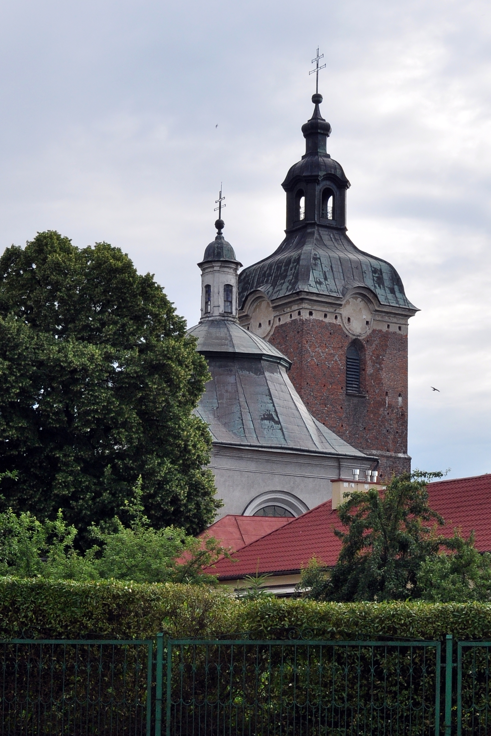 Bazylika kolegiacka Ducha Świętego w Przeworsku